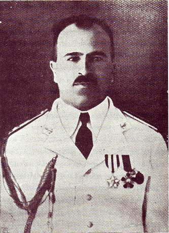 Gholamali Bayandor, Admiral, Iran Navy. Original upload fa.wikipedia by علی رجبی